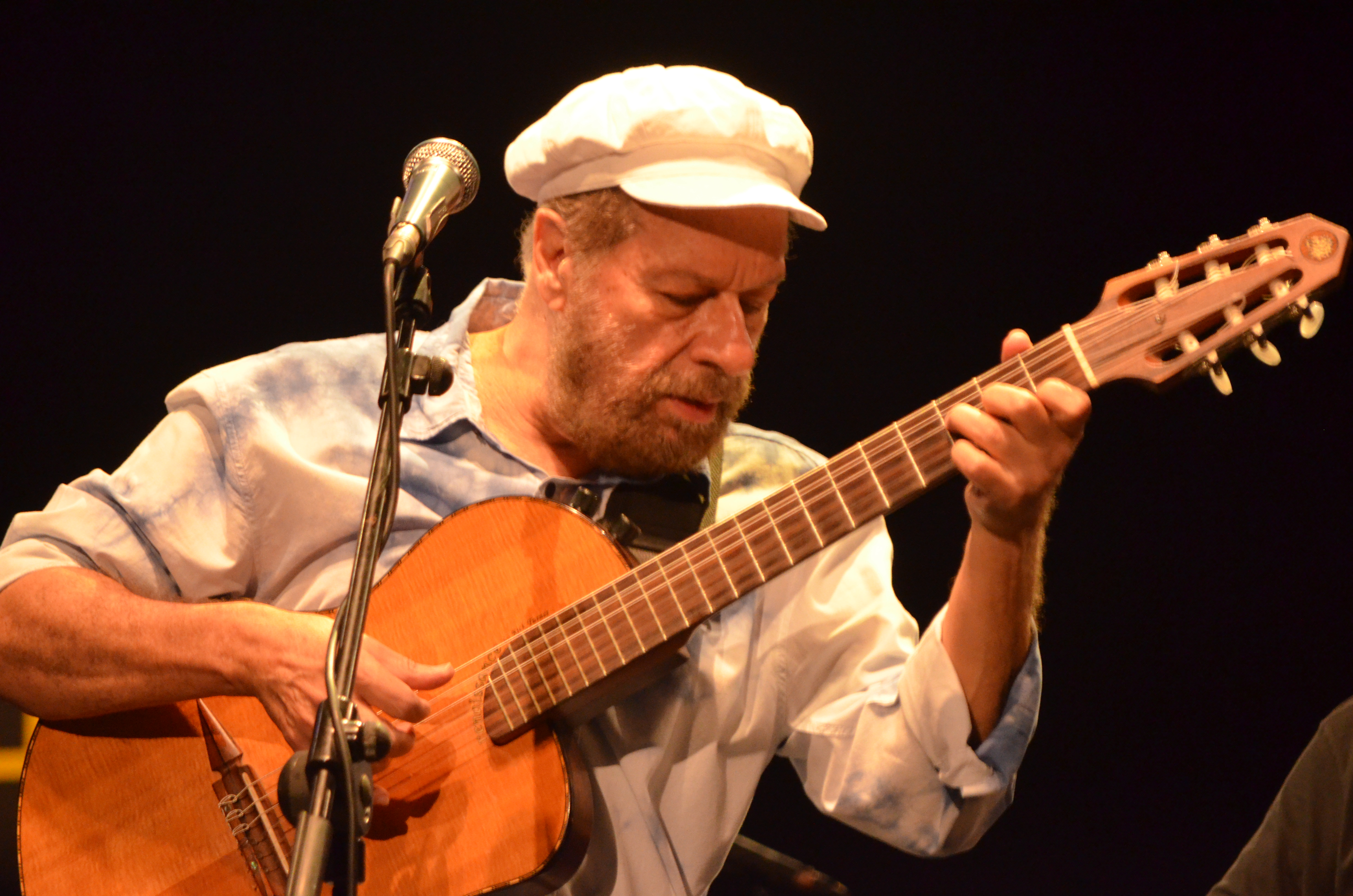 Concierto de Joao Bosco en el Festival Internacional de Jazz de San Javier 2018: Joao Bosco (cantante y guitarra), Ricardo Silveira (guitarra), Guto Wirtti (contrabajo) y Kiko Freitas (batería)